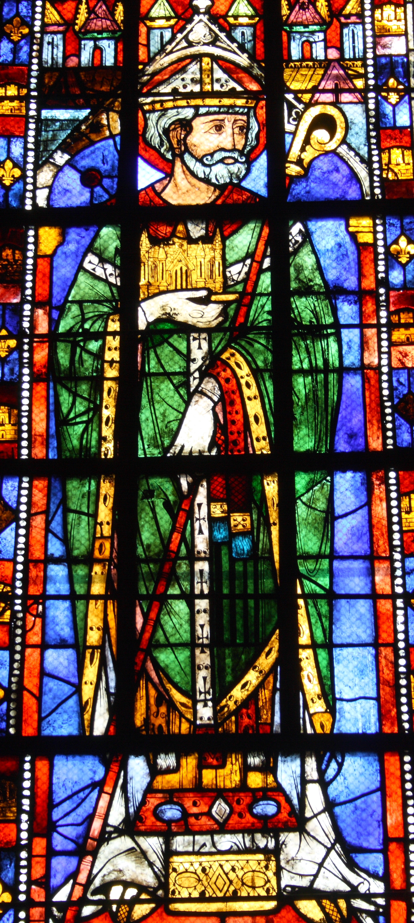 Kirche Sainte-Anne in Gassicourt, einem Stadtteil von Mantes-la-Jolie im Département Yvelines (Region Île-de-France/Frankreich), Bleiglasfenster (baie 2) aus der zweiten Hälfte des 13. Jahrhunderts; Darstellung: Heiliger Eligius